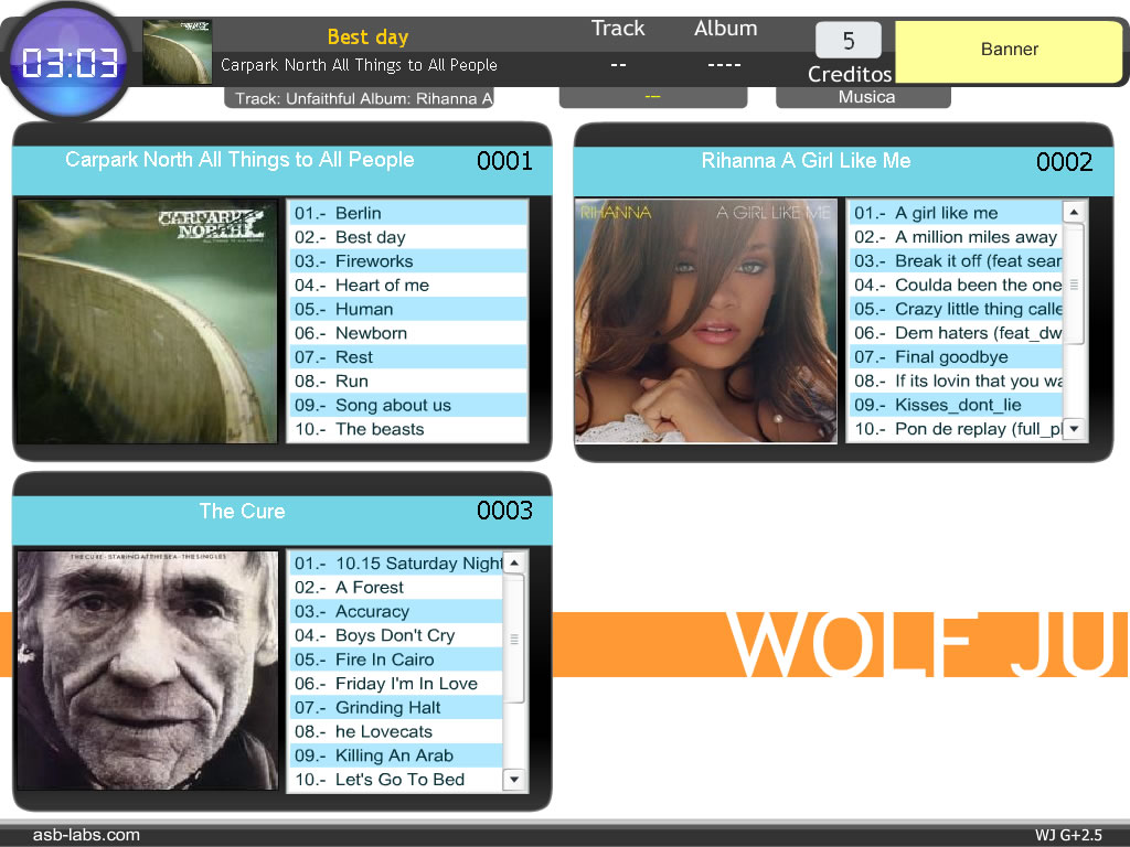 Imagen de rockola digital